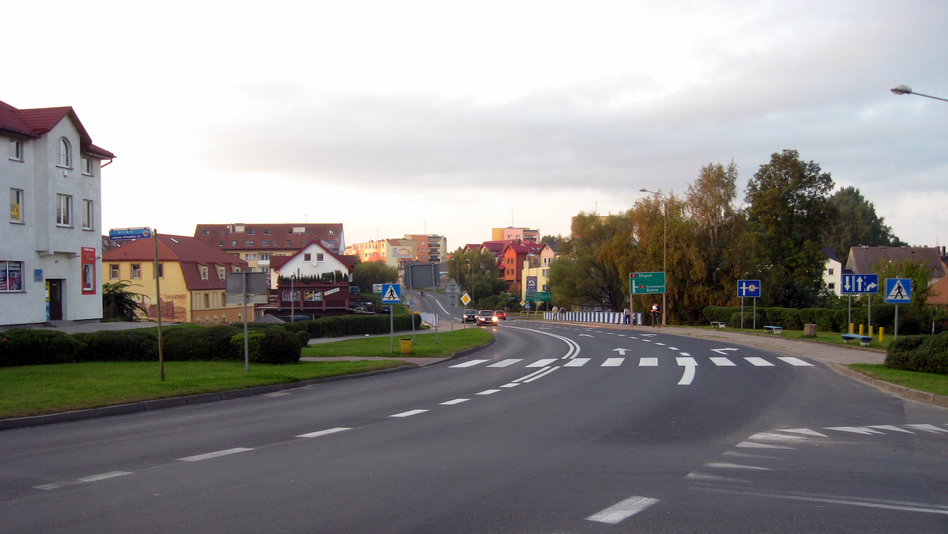 Miastko